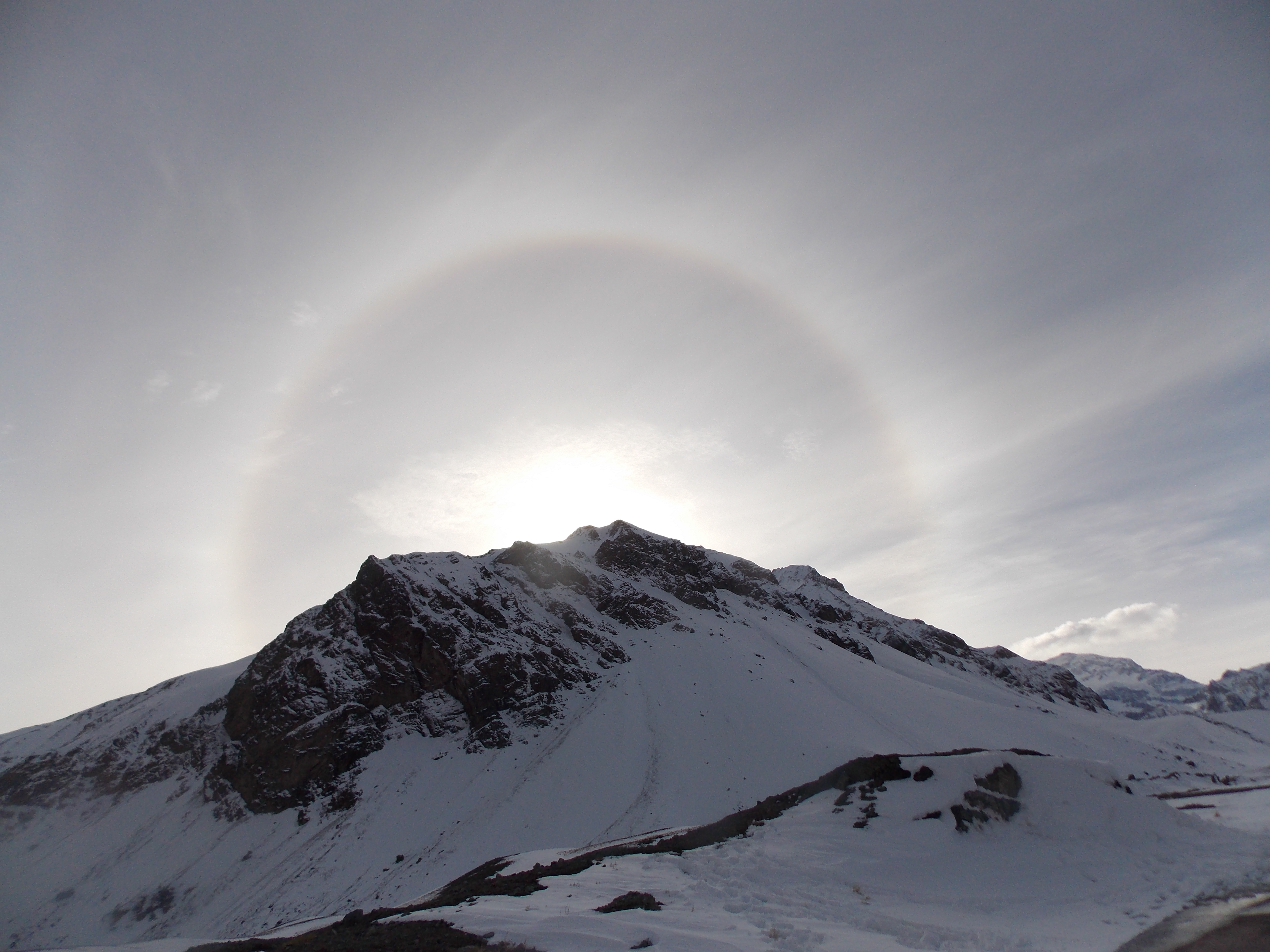 Parque Aconcagua, Mendoza, Argentina